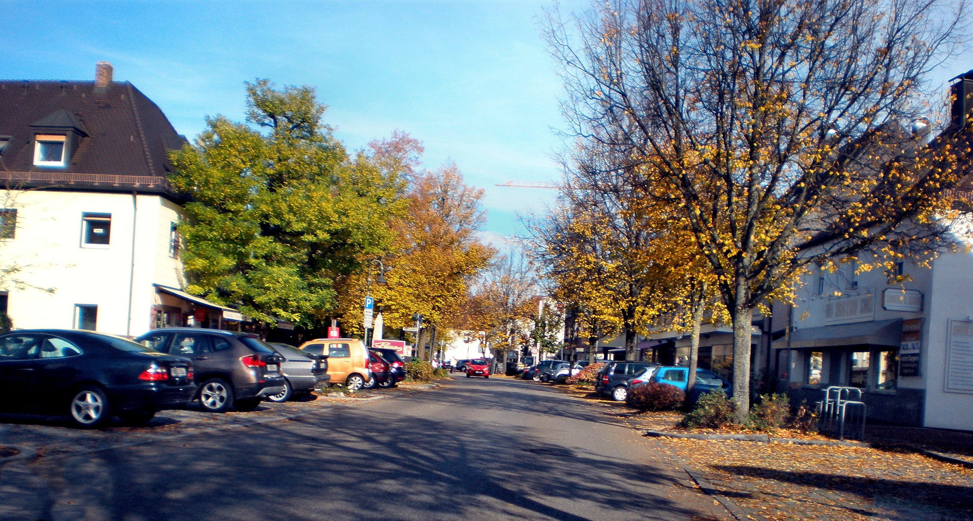 Unterschleißheim, Untere Bezirksstraße